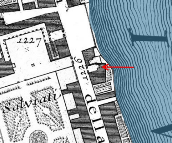 Pianta di Nolli